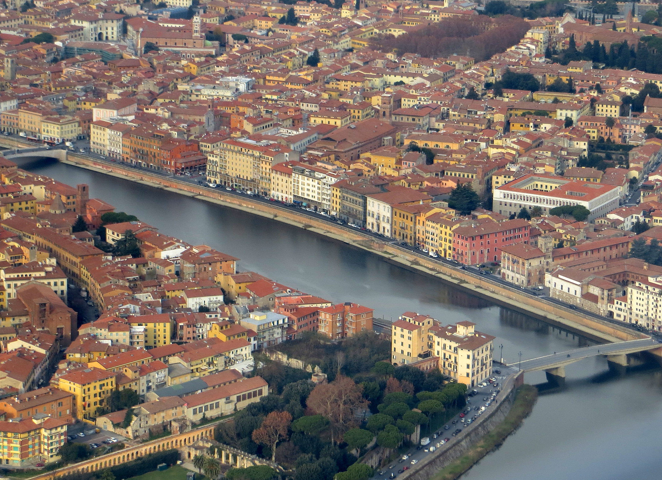 Veduta aerea di Pisa. In primo piano il fiume Arno e il ponte della Fortezza